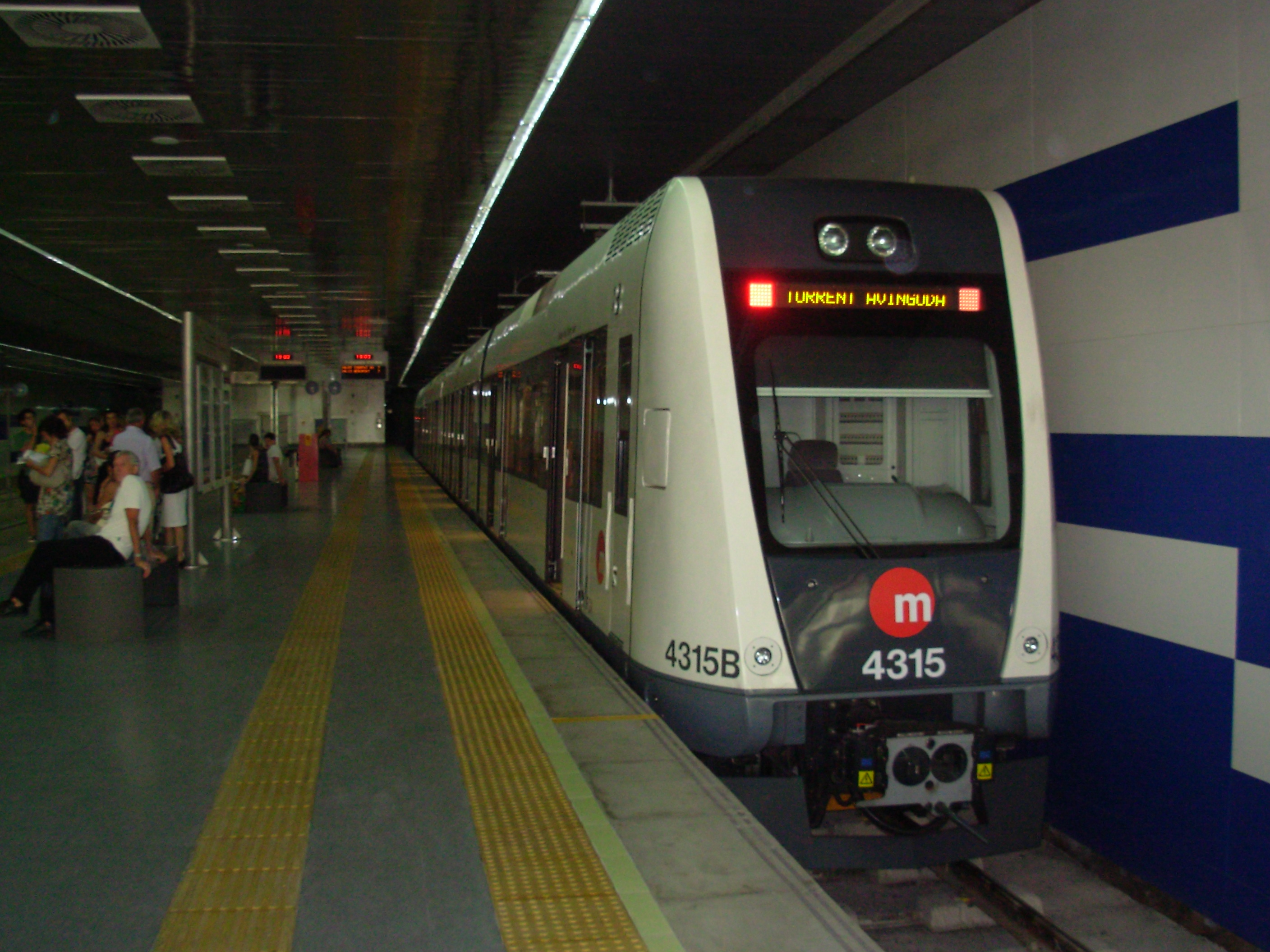 Train de la ligne 5 au terminus Maritim-Serreria (Train at Maritim-Serreria) à Valence